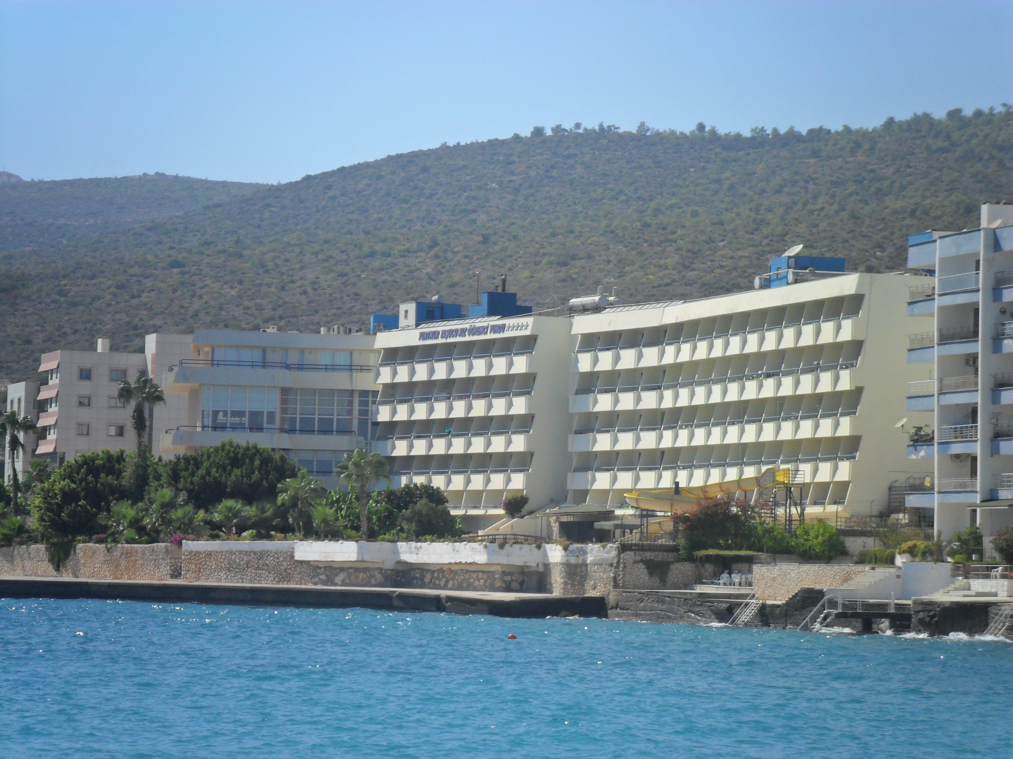 Mersin Üniversitesi Silifke Yüksekokulu ve Selçuklu Üniversitesi Taşucu Yüksekokulu kız öğrencilerinin kullandığı yüksek ücretli devlet yurdu.